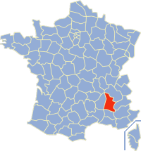 Localisation du département de la Drôme